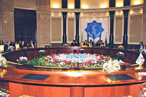 АШХАБАД. Встреча глав прикаспийских государств.